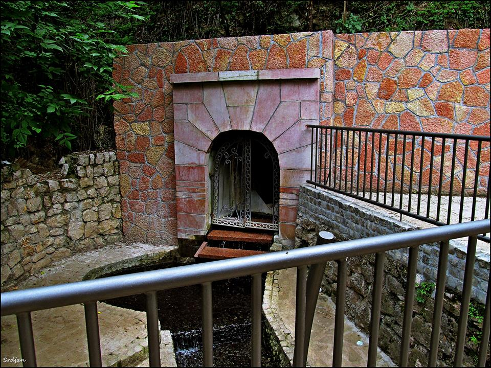 Српски (ћирилица): Сува бања, један од термоминералних извора Нишке Банје